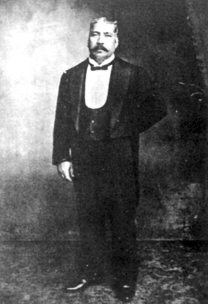 Silas Aaron Hardoon, 哈同 (1851 ~ 1931-06-19)